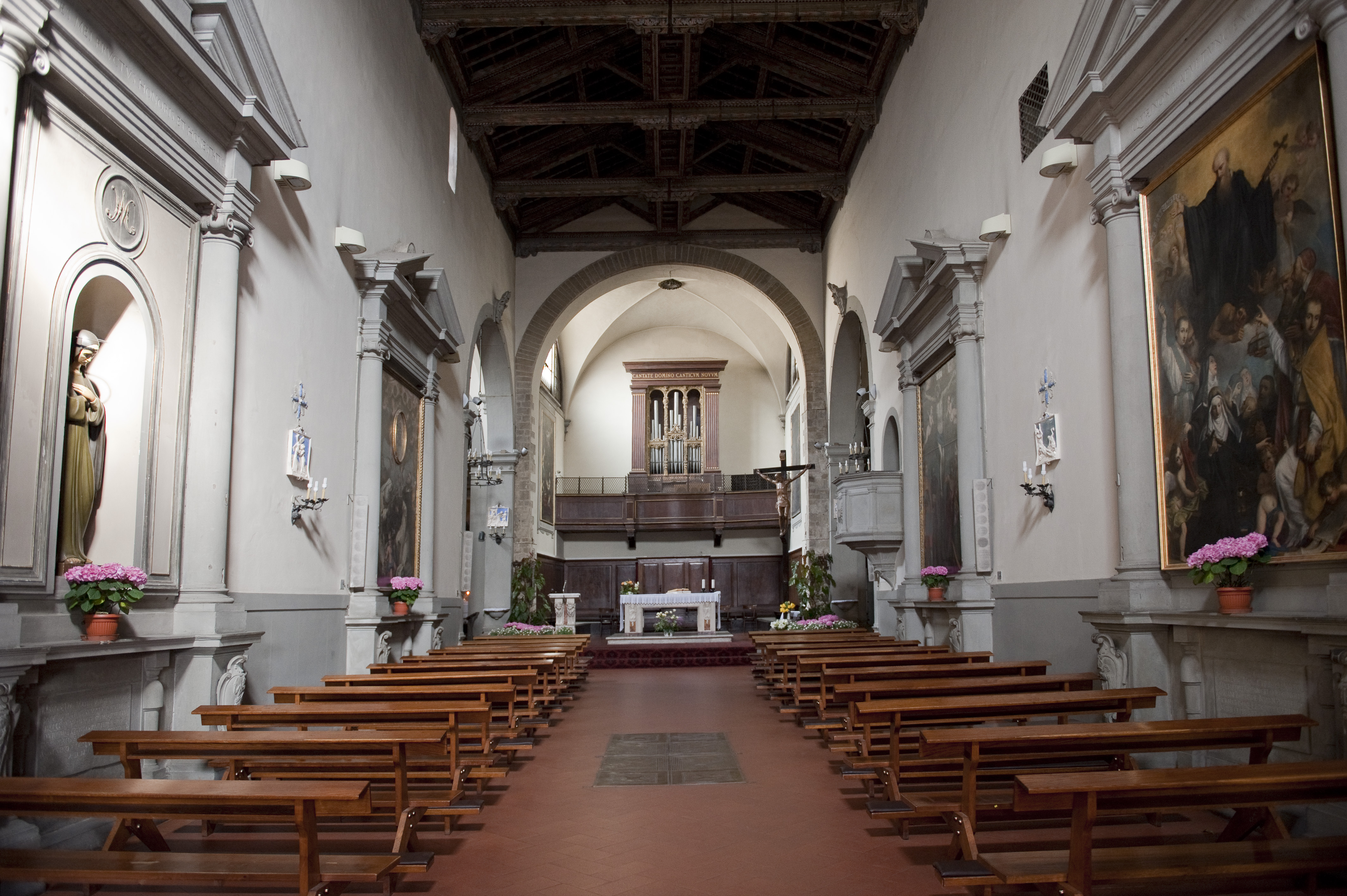 Interno della Abbazia di San Bartolomeo a Ripoli (Firenze)